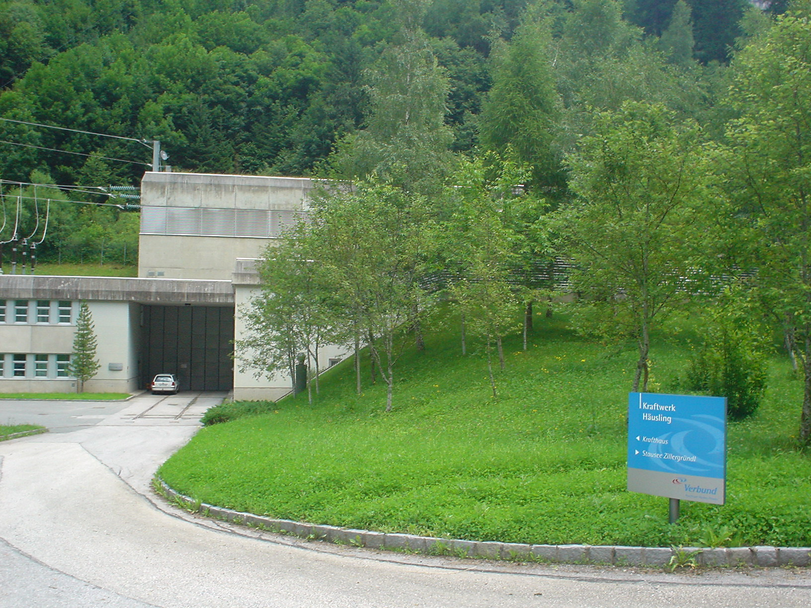 Kraftwerk Häusling Aussenanlagen